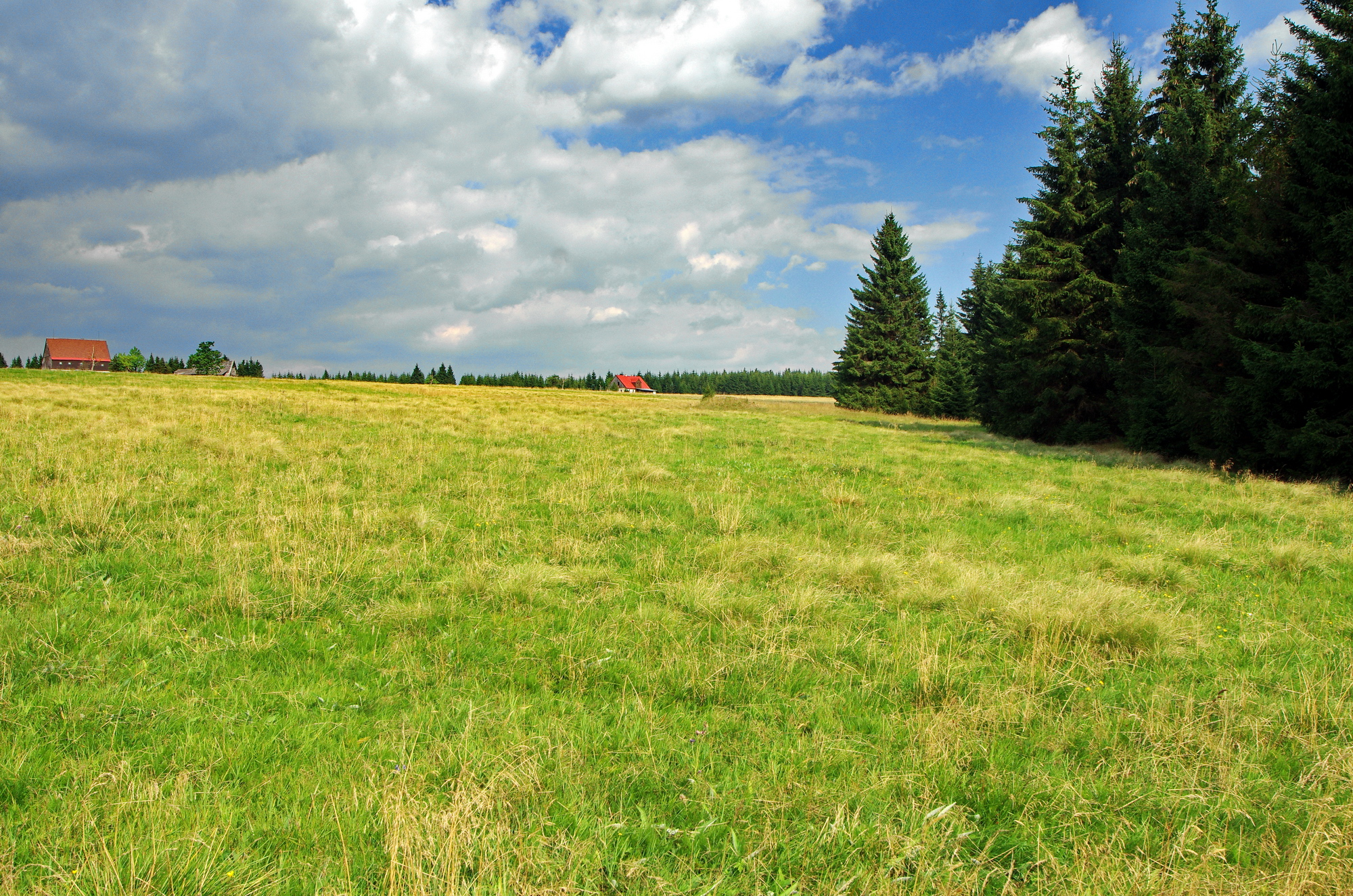 zaniklá osada Bludná u Horní Blatné, spadá Pernink, okres Karlovy Vary